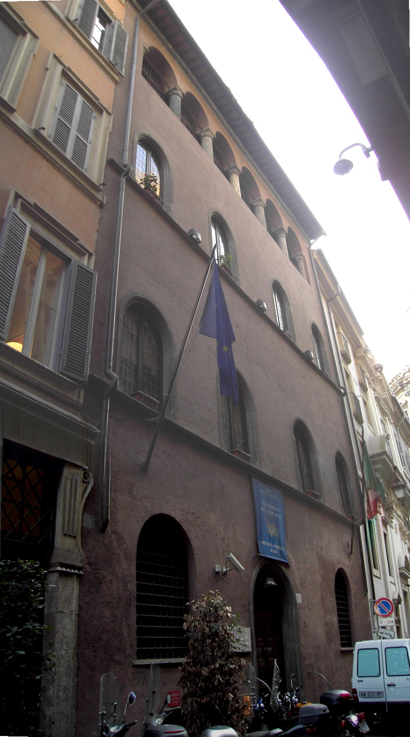 Roma, palazzetto del Burcardo all'Argentina (via del Sudario)